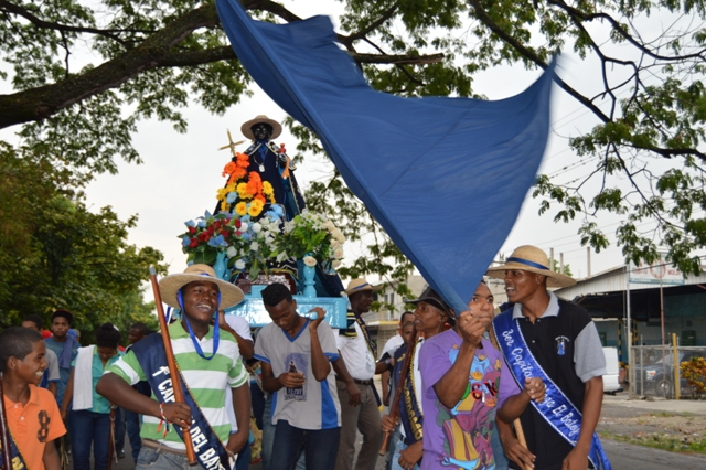 Fiestas San Benito Sucre Zulia